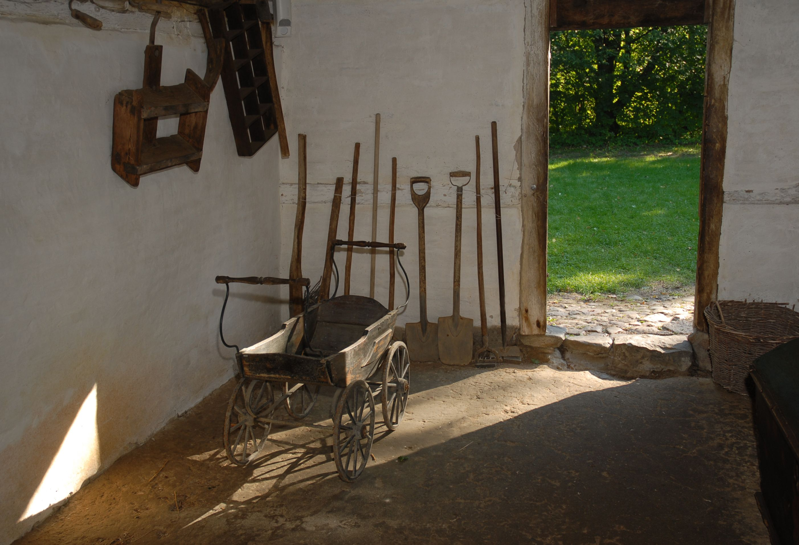 Engleruphusets lo med lille trækvogn og opstilling af diverse håndredskaber